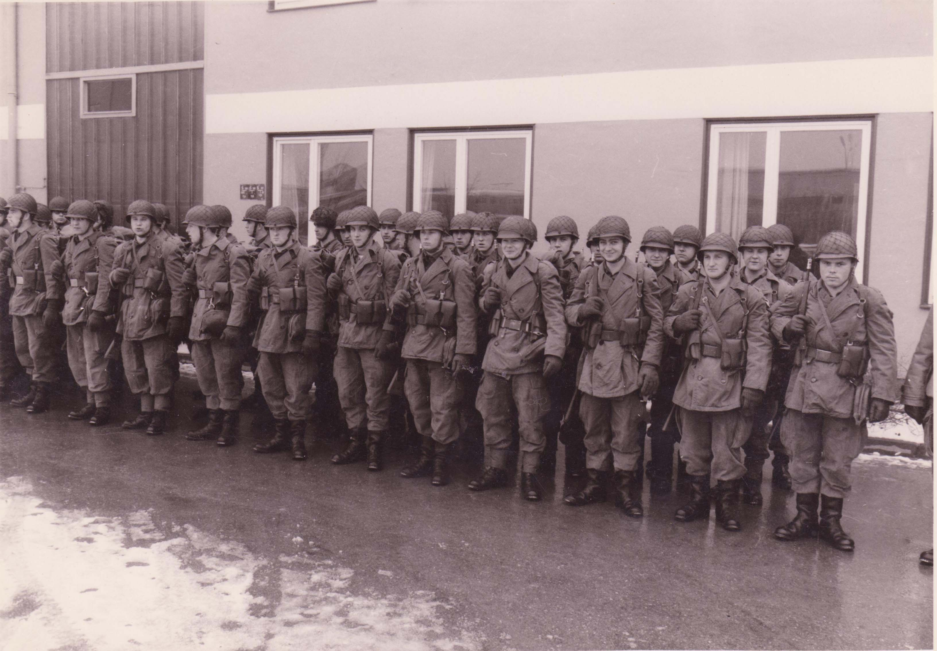 Panzergrenadiere der Bundeswehr 1968 Alfred Delp Kaserne Donauwörth. 8. Ausbildungskompanie der ehemaligen 10. Panzergrenadierdivision